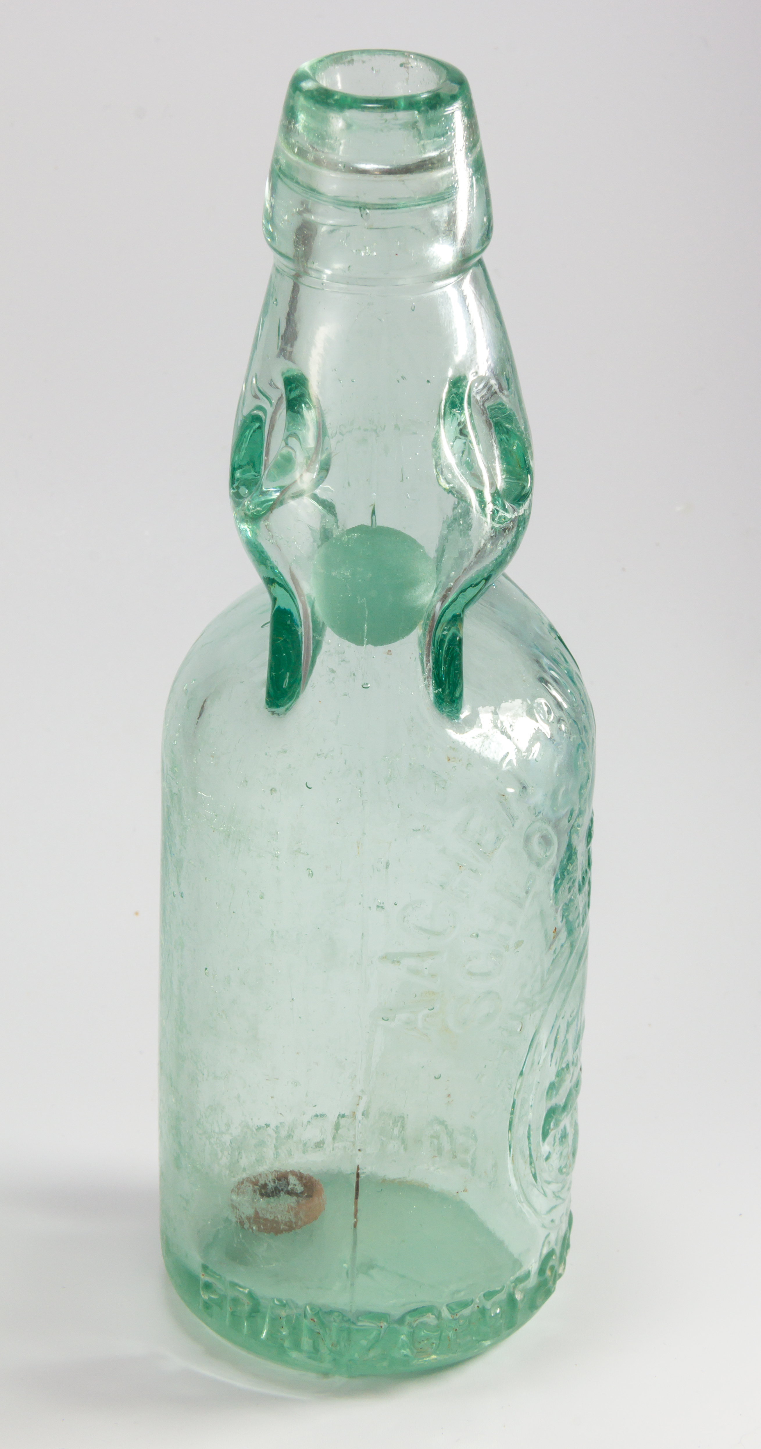 Kugelverschlussflasche, Klickerflasche des Aachener Schlossbrunnens, mit Kugelsperre und Kugelfang im Hals